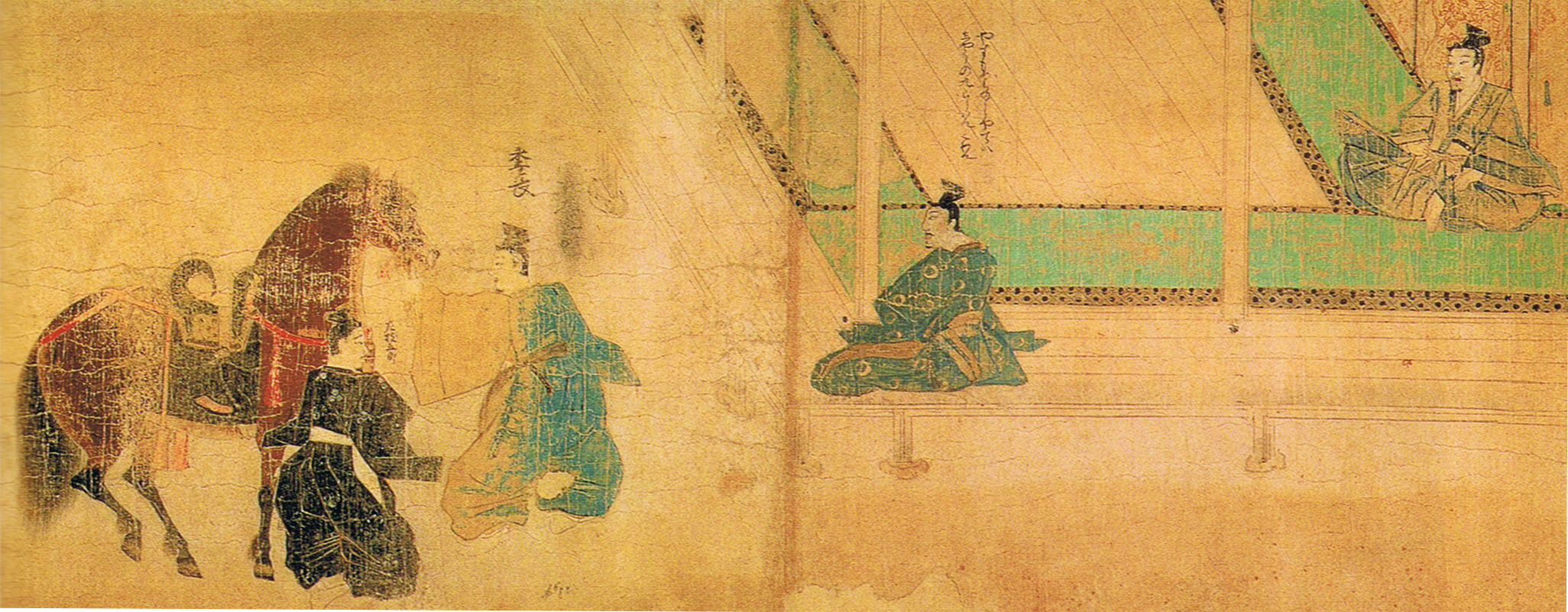 『蒙古襲来絵詞』前巻、絵十 安達氏甘縄邸で安達泰盛から馬を拝領する竹崎季長。縁側にいるのは泰盛の弟安達長景。